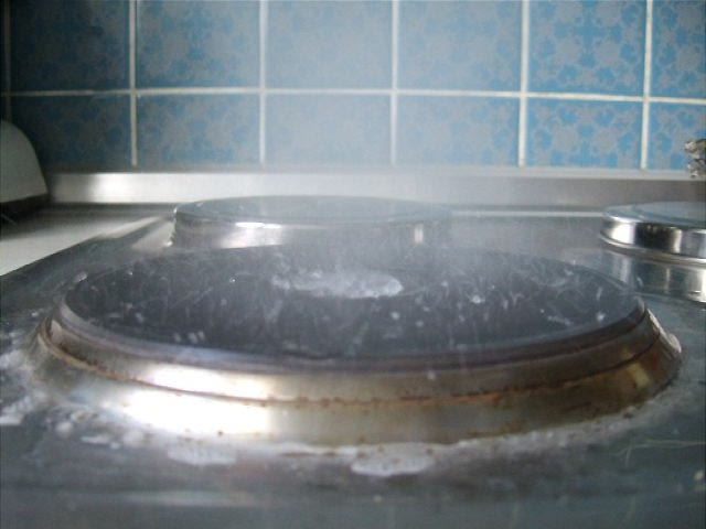 Das Wasser verdampft schlagartig beim Kontakt mit einer heißen Herdplatte.